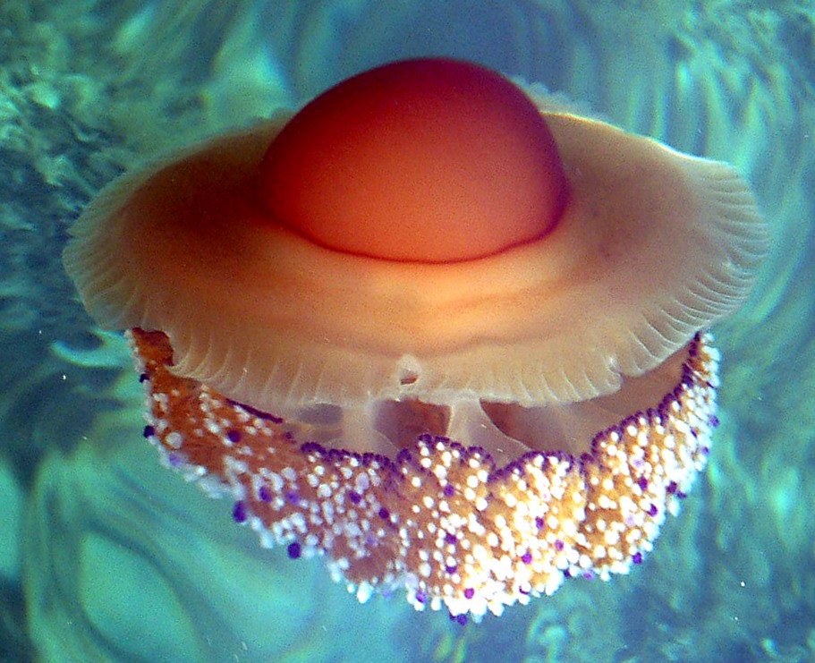 Spiegeleiqualle in der kroatischen Adria (Cotylorhiza tuberculata)